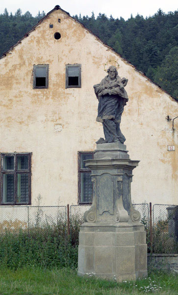 Barokní socha sv. Jana Nepomuckého před čp. 52 v Nebřezinách, okres Plzeň-sever.